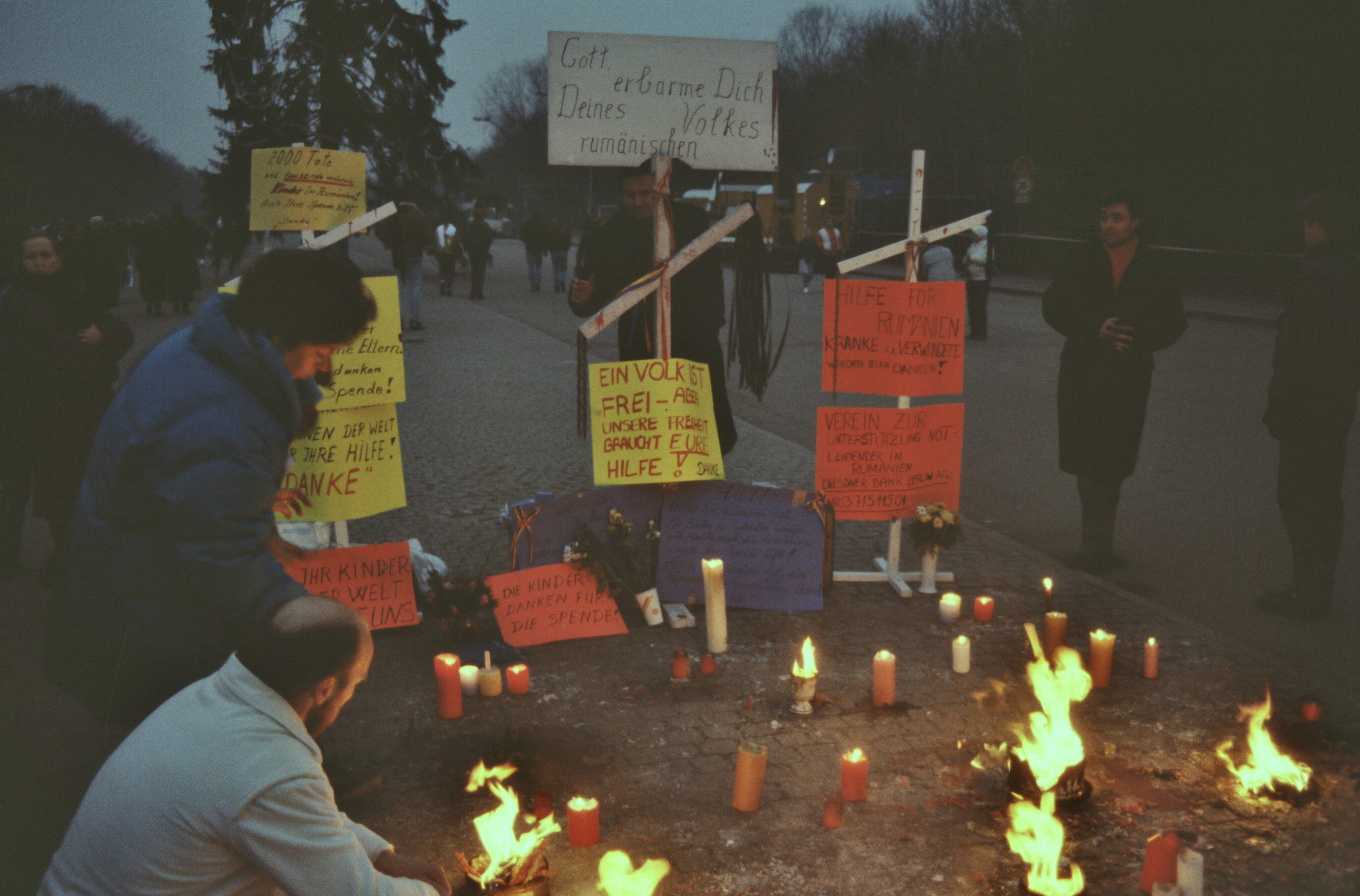 Mahnwache in Berlin mit verschiedenen Plakaten. "Erbarme Dich Deines rumänischen Volkes", "Hilfe für Rumänien..." in Zusammenhang mit der Rumänische Revolution 1989